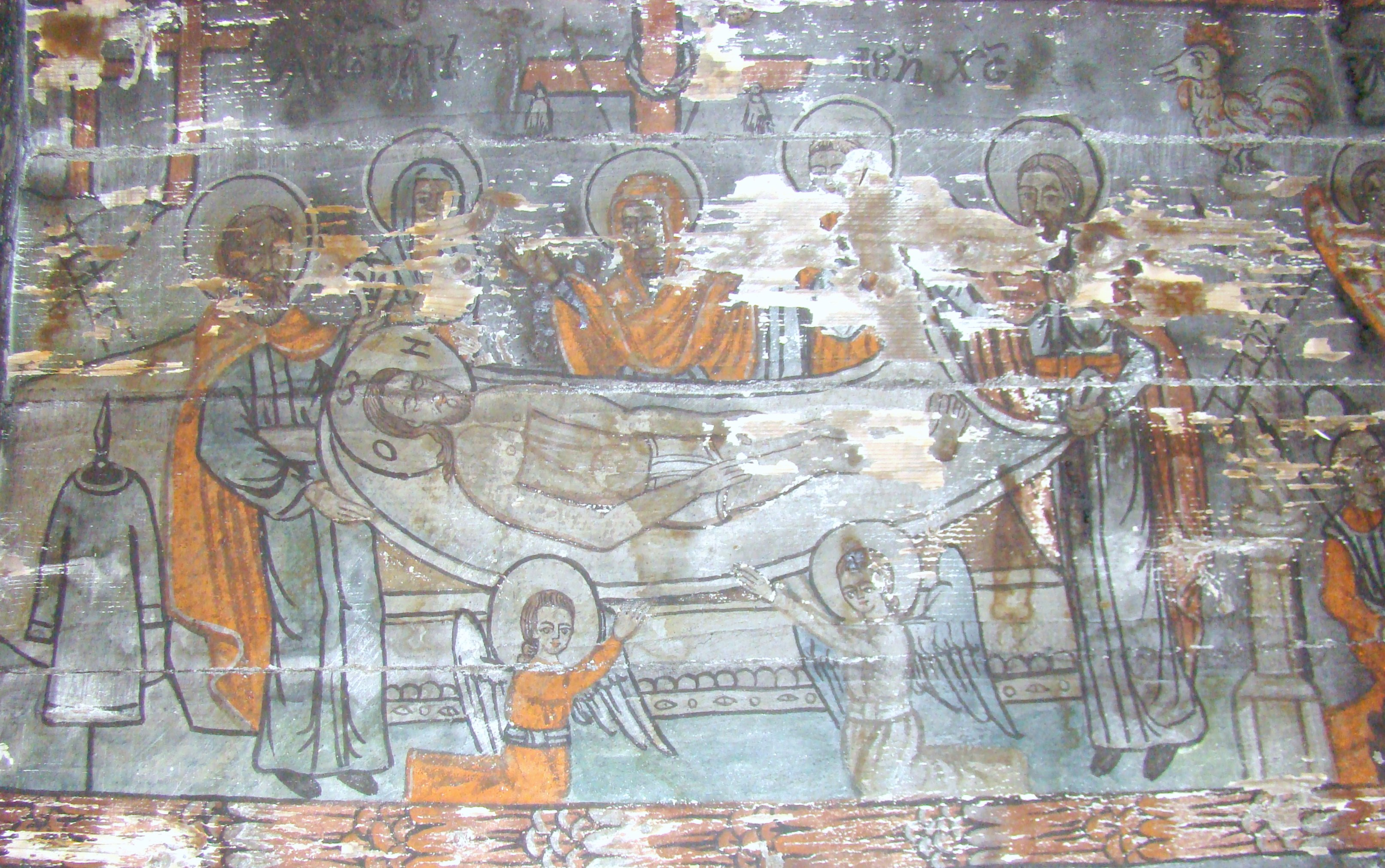 Biserica de lemn din Straja, comuna Căpușu Mare, județul Cluj